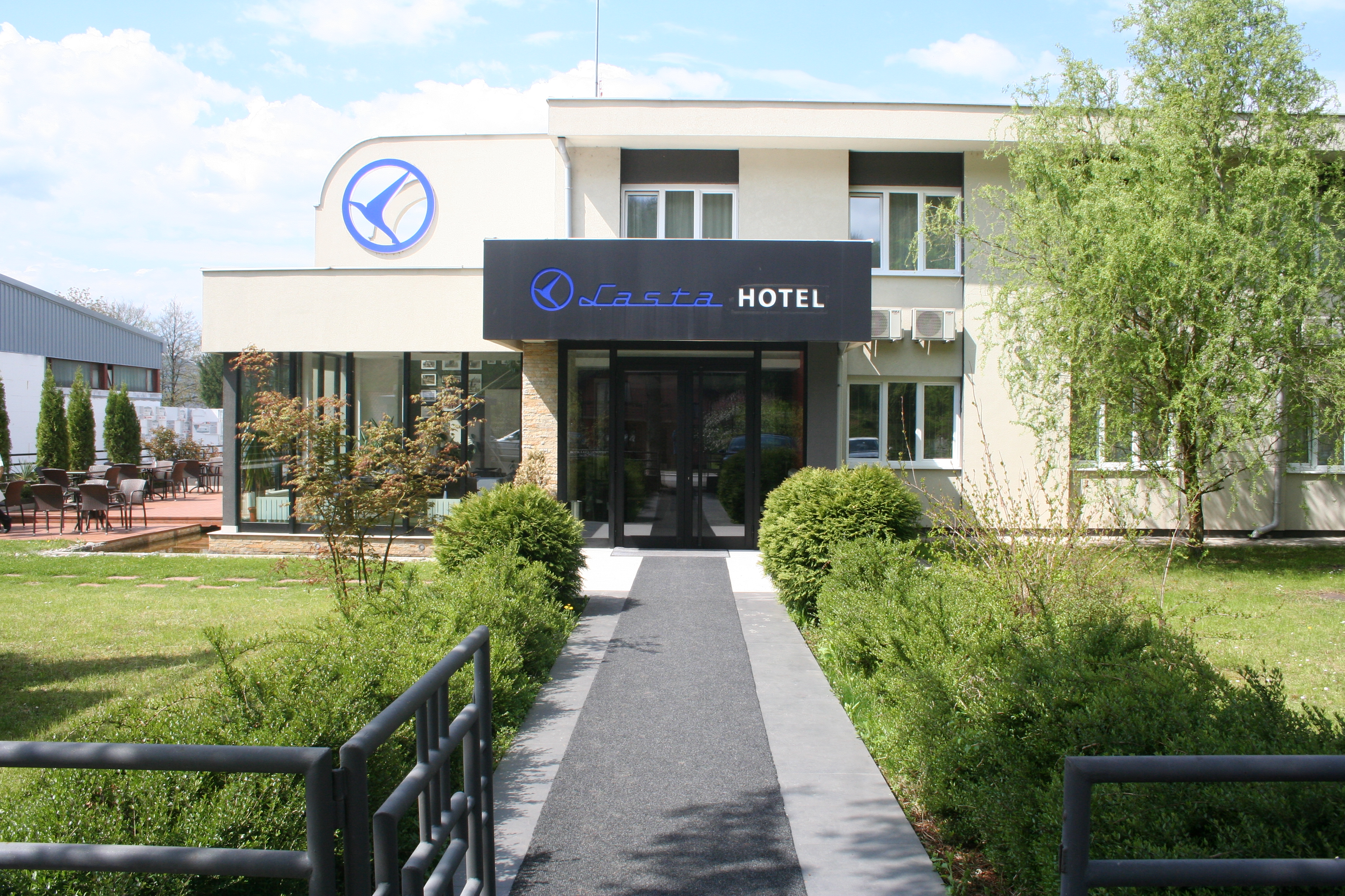 Ljubovija